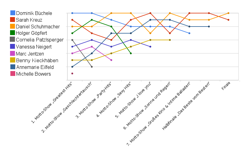 Platzierungen in den Mottoshows laut offiziellem Ergebnis des Telefonvotings. Angaben in Platzierungen, nicht Prozent.